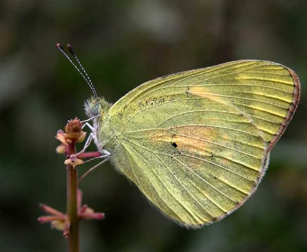 Small Salmon Arab, Colotis amata in Bangalore